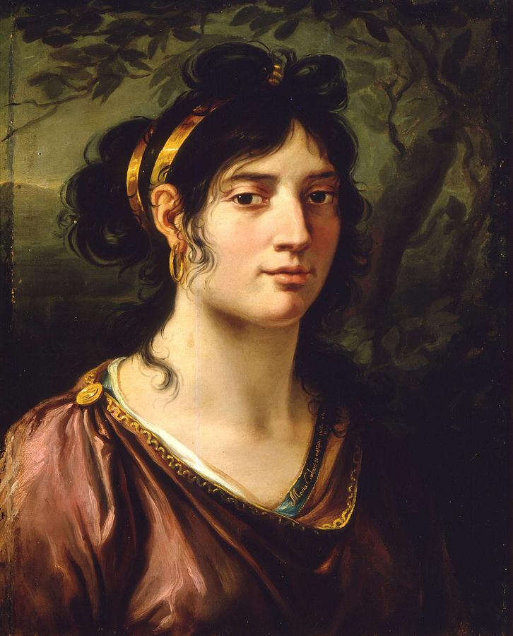 "Autoritratto", olio su tavola, 50 x 40 cm., firmato, Parma, Galleria nazionale